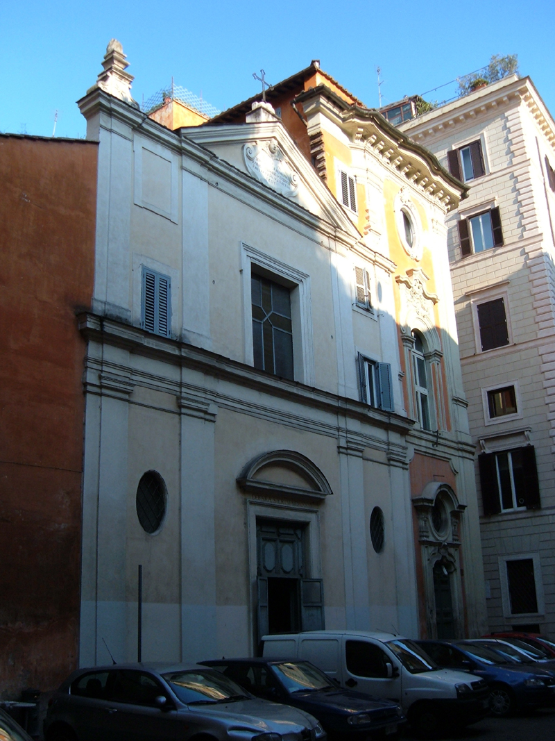 Chiesa di S. Maria in Monterone, nel rione Sant'Eustachio, a Roma. Foto personale.